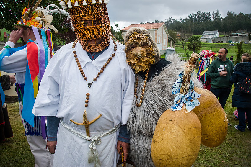 Vixigueiros ou contrarios, personaxes do Entroido de Samede